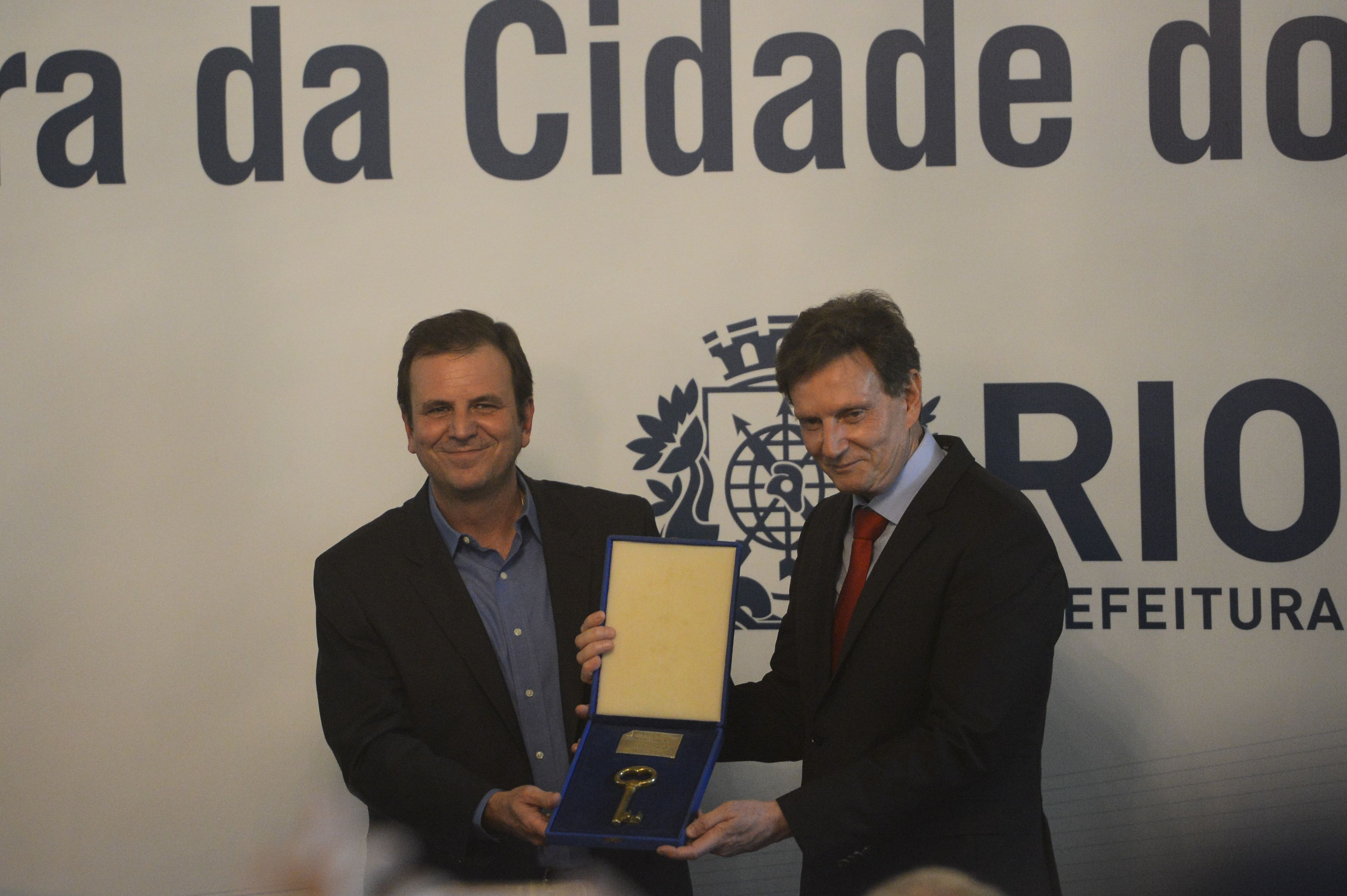 Eduardo Paes e Marcelo Crivella na cerimônia de transmissão de posse no Palácio da Cidade, Rio de Janeiro, em 1 de janeiro de 2017. Paes está entregando a chave da Fortaleza de São João, o simbolo da passagem do cargo.